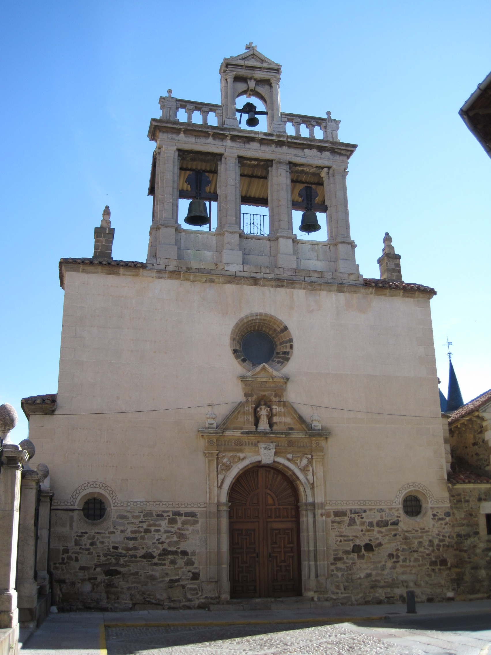 Iglesia de Santa Marta, Astorga (León, España).